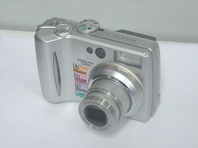 Appareil photographique numérique Nikon Coolpix 5200 Vue de 3/4